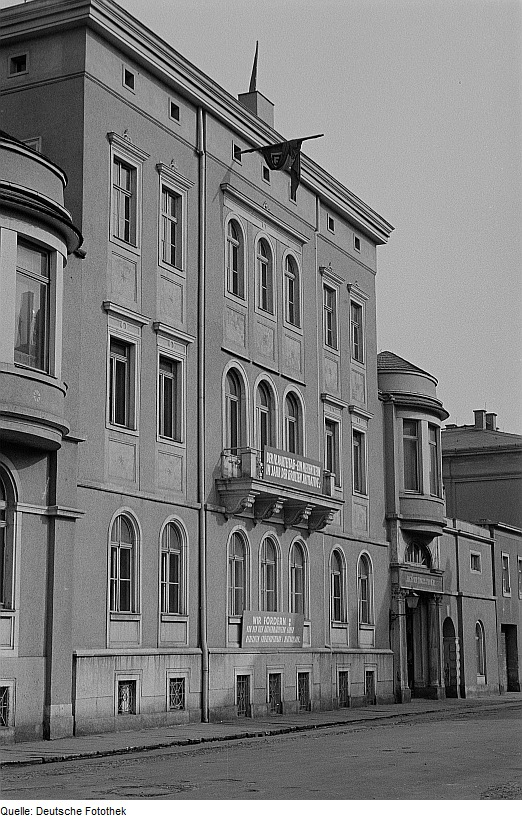 Original image description from the Deutsche Fotothek Bild Haus der Jungen Pioniere